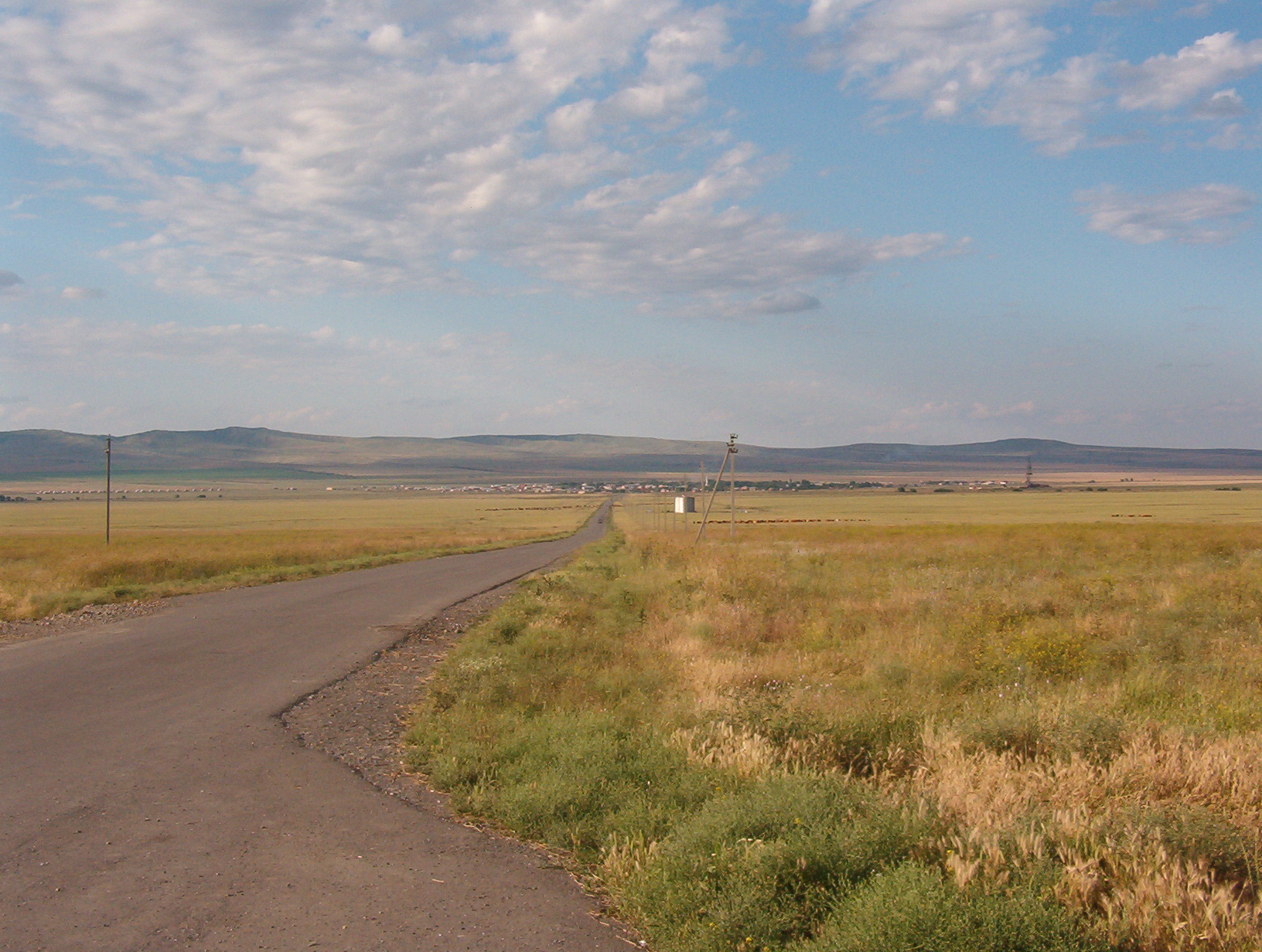 с. Новый Редант, Малгобекский район РИ